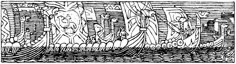 Gerhard Munthe: Illustration for Magnussønnens saga. Snorre 1899-edition. nn: «Kong Sigurd seglar ut frå landet.» nb: «Sigurds ferd fra landet.»